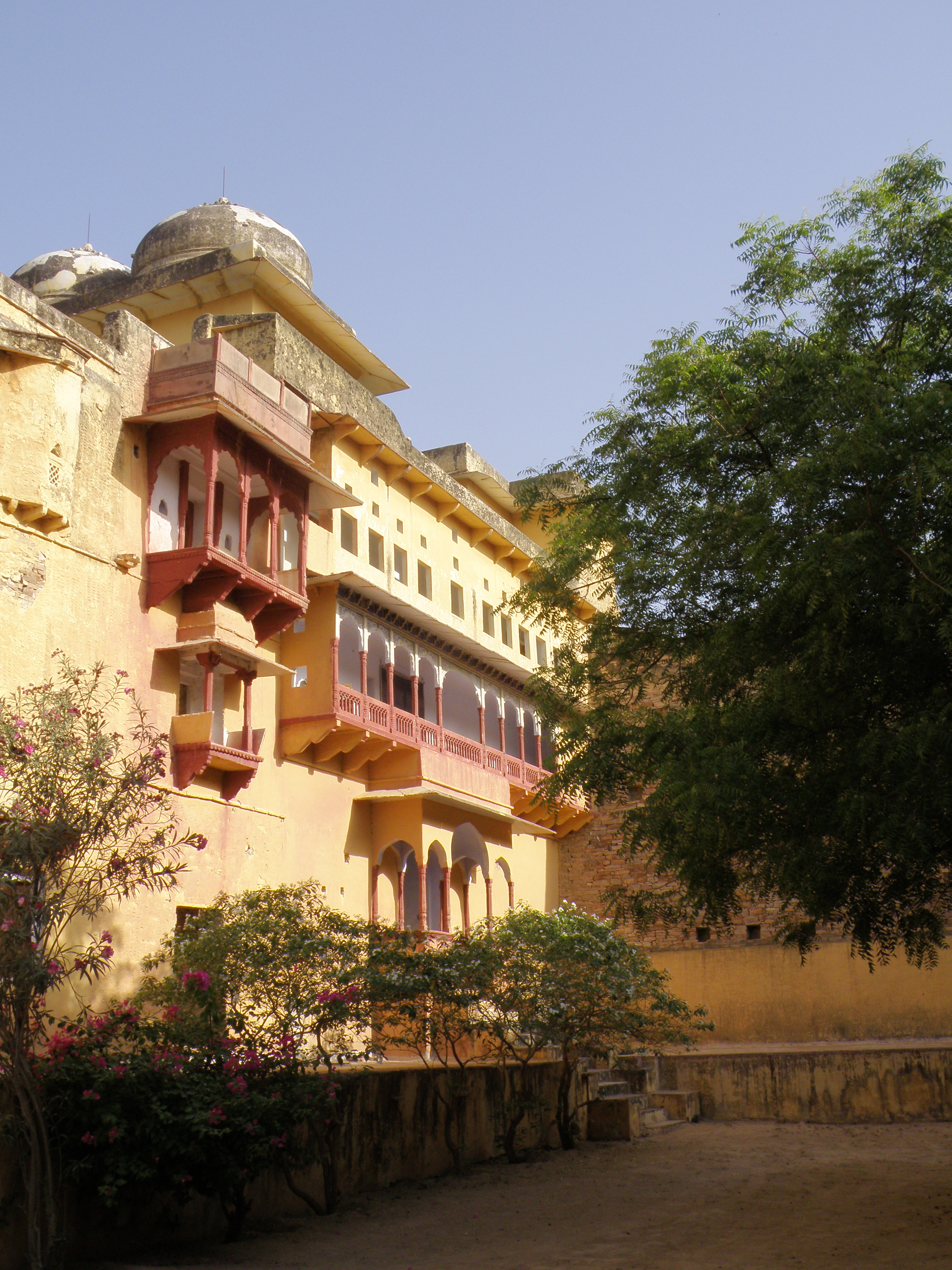 Le palais - Le Fort de Ramathra est un bastion des Rajputs situé près de la ville de Sapotara dans le District de Karauli au Rajasthan en Inde.